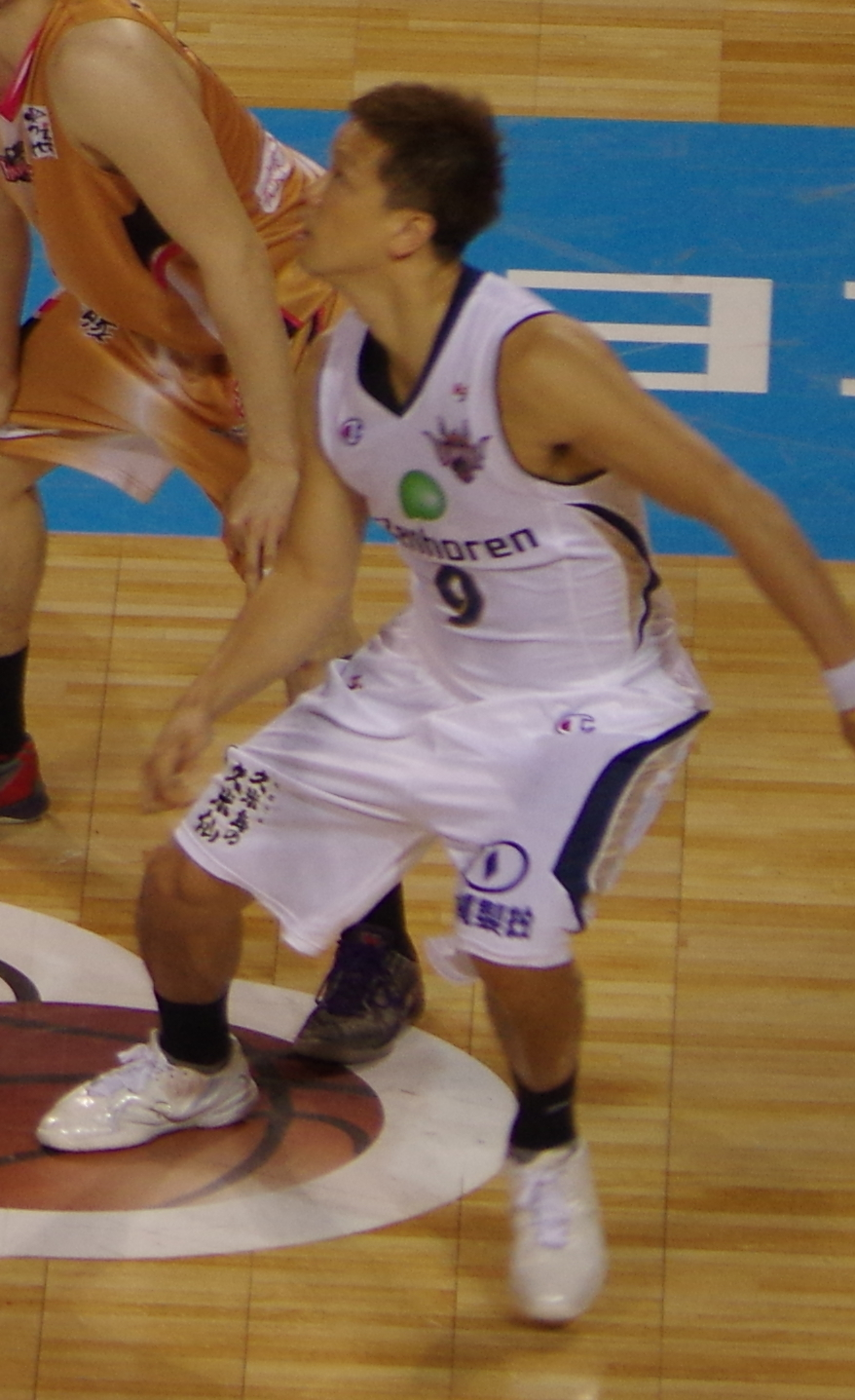 ｂｊリーグ 2013-2014シーズン プレイオフ ファイナルズ_023